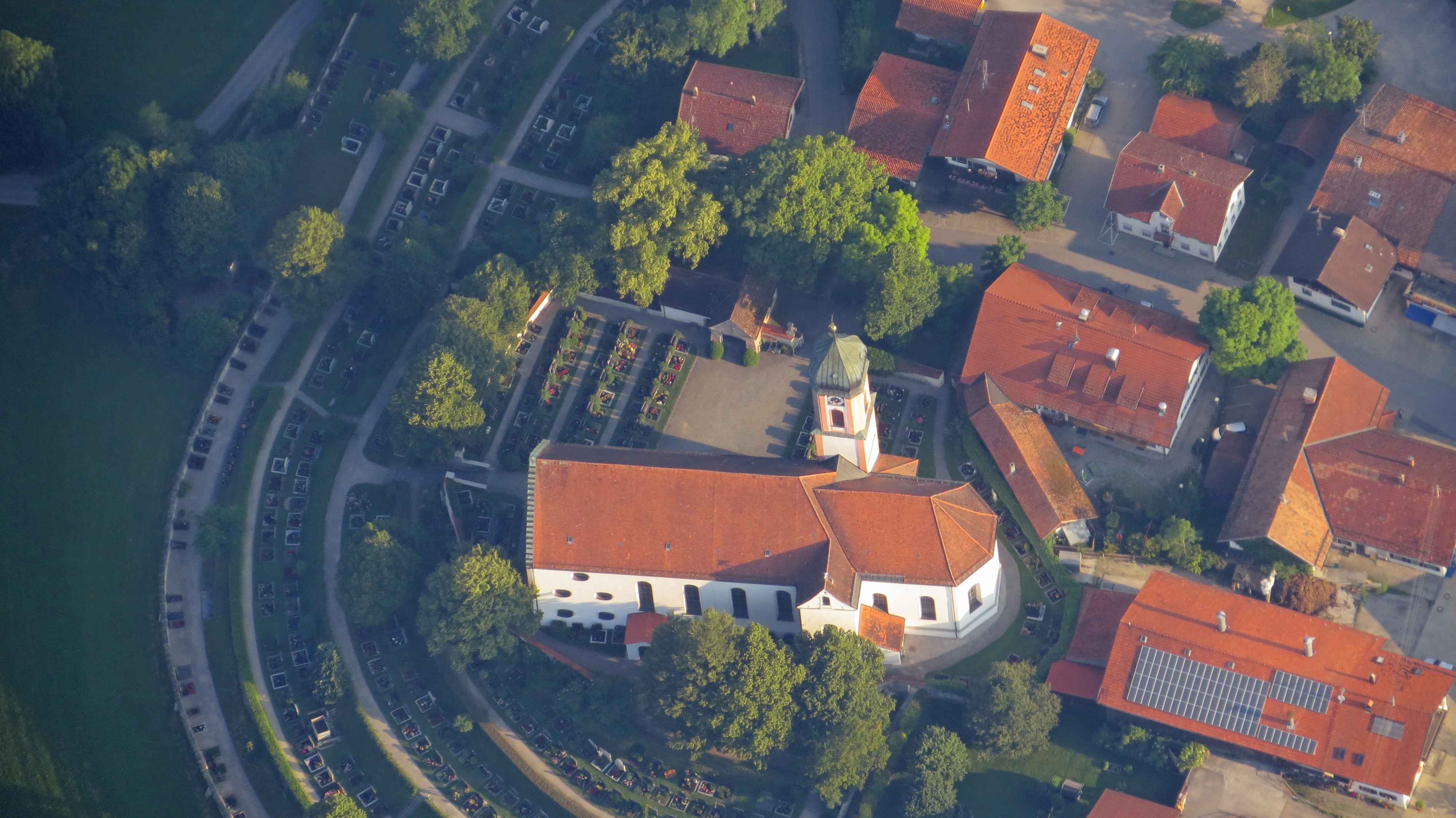 St. Ulrich in Seeg von oben